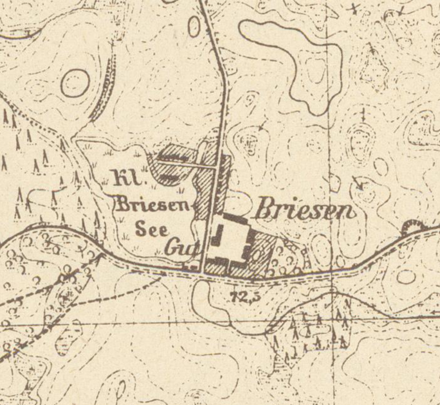 Briesen, Wohnplatz der Gemeinde Gerswalde, Lkr. Uckermark, Brandenburg, Ausschnitt aus dem Messtischblatt 2848 Gerswalde von 1882